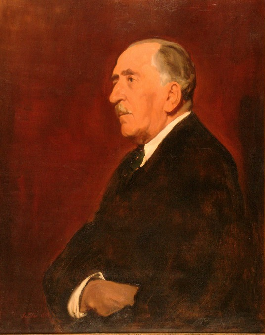 Herczeg Ferenc magyar újságíró, színműíró, a Magyar Tudományos Akadémia tagja és másodelnöke.